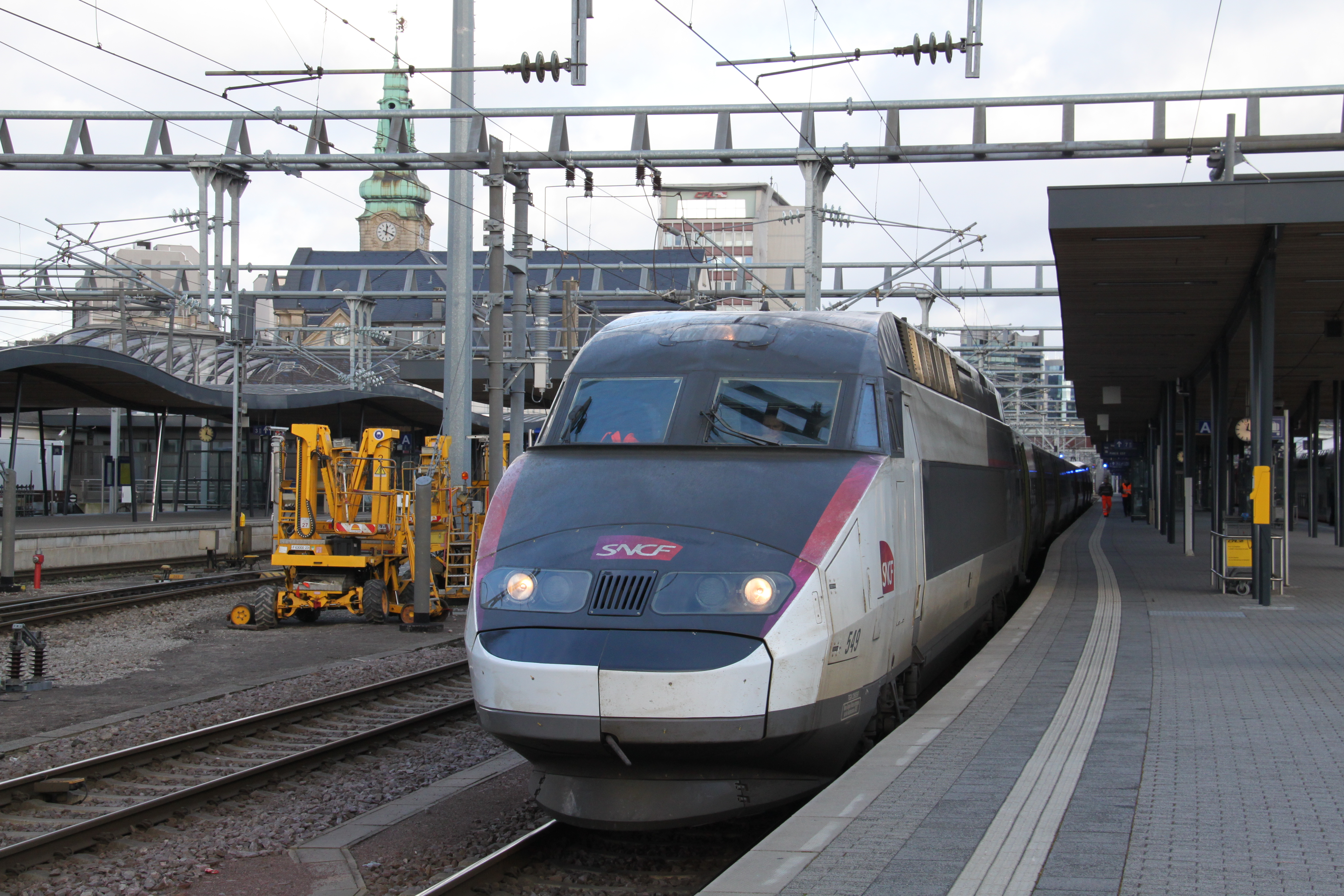 Een TGV-Reseau Lacroix met nummer 549 in het station van Luxembourg